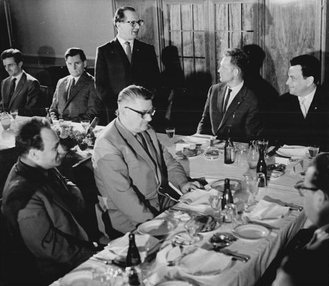 Berlin, Empfang für Radrennfahrer, Honecker Zentralbild Kohls.Nl-Hr 18.5.1961.Berlin: Auszeichnungen für die Friedensfahrer. Aus den Händen des Mitglieds des Politbüros des ZK der SED Erich Honecker und des Vorsitzenden des Staaltichen Komitees für Körperkulutr und Sport, Alfred Neumann, erhielt auf einem Empfang des Deutschen RAdsportverbandes am 18.5.1961 im Gästehaus der Regierung der Kapitätn er DDR-Friedensfahrtmannschaft, Gustav Adolf Schur, für deine zehnmalige teilnahem am größten Amateur-Strassenrennen der Welt und für seinen erfolgreichen Einsatz bei der diesjährigen Friedensfahrt die Verdienstmedaille der Deutschen Demokratischen Republik. Diese hohe staatliche Auszeichnung wurde auch dem Weltmeister Bernhard Eckstein für seinen hervorragenden Dritten Platz zuteil. Der Benjamin der DDR-Mannschaft. Lothar Höhne, wurde in Anerkennung seiner Verdienste mit dme Titel "Meister des Sports" ausgezeichnet. UBz: Erich Honecker übermittlet den Friedensfahrern die herzlichsten Glückwünsche des 1. Sekretärs des ZK der SED, Walter Ulbricht, und des Ministerpräsidenten Otto Grotewohl, zu ihrem erfolgreichen Abschneiden in dem bisher schwersten Rennen der Geschichte der Friedensfahrten. Am Präsidium vlnr: Bernhard Eckstein, Manfred Ewald, Erich Honecker, Gustav-Adolf Schur und Alfred Neumann.